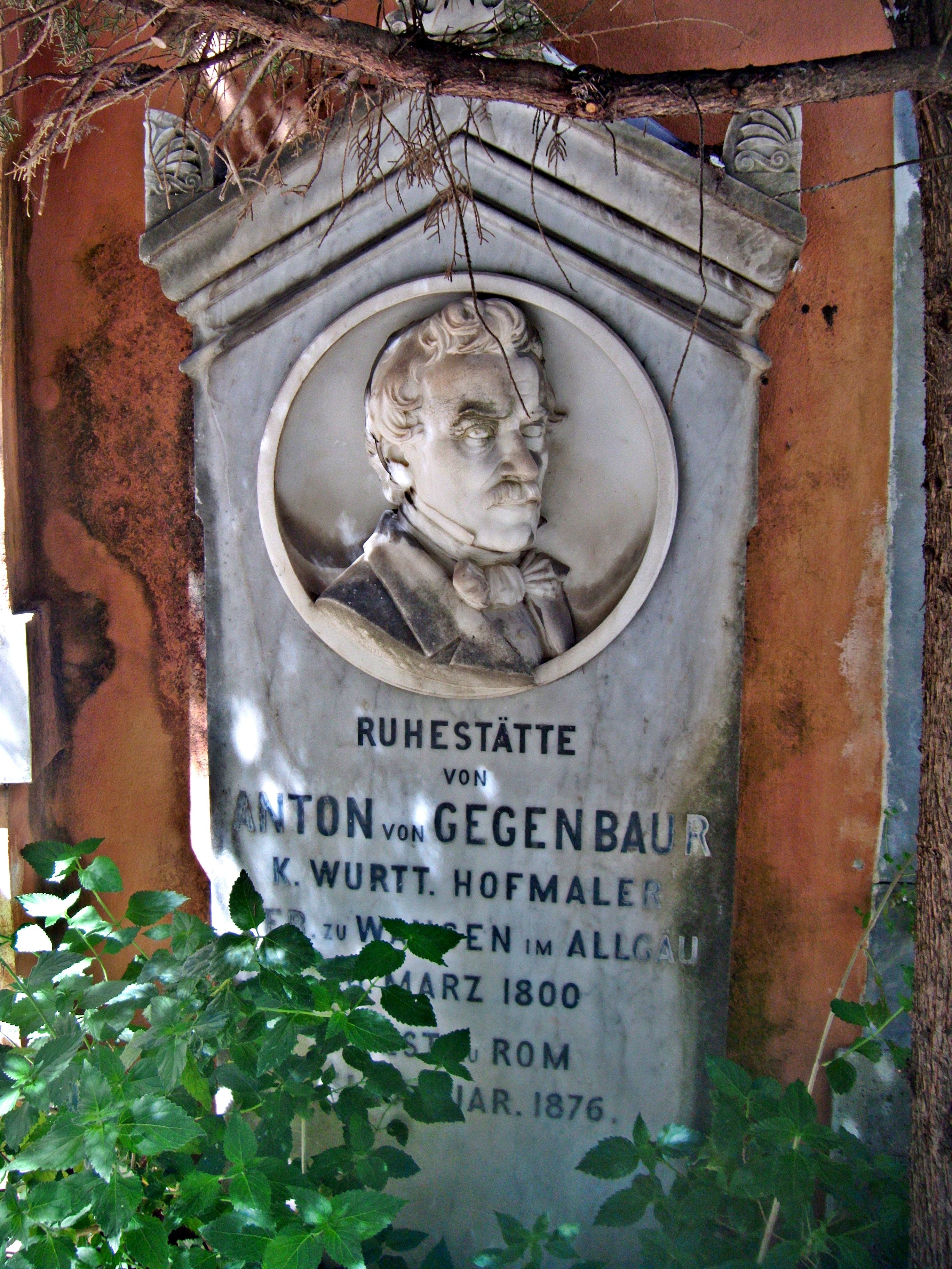 Grabstein des Malers Joseph Anton von Gegenbaur (1800-1876), Rom, Campo Santo Teutonico